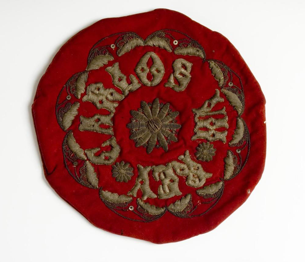 Karlistaldietan, Liberalek eta Karlistek erabili zuten txapela